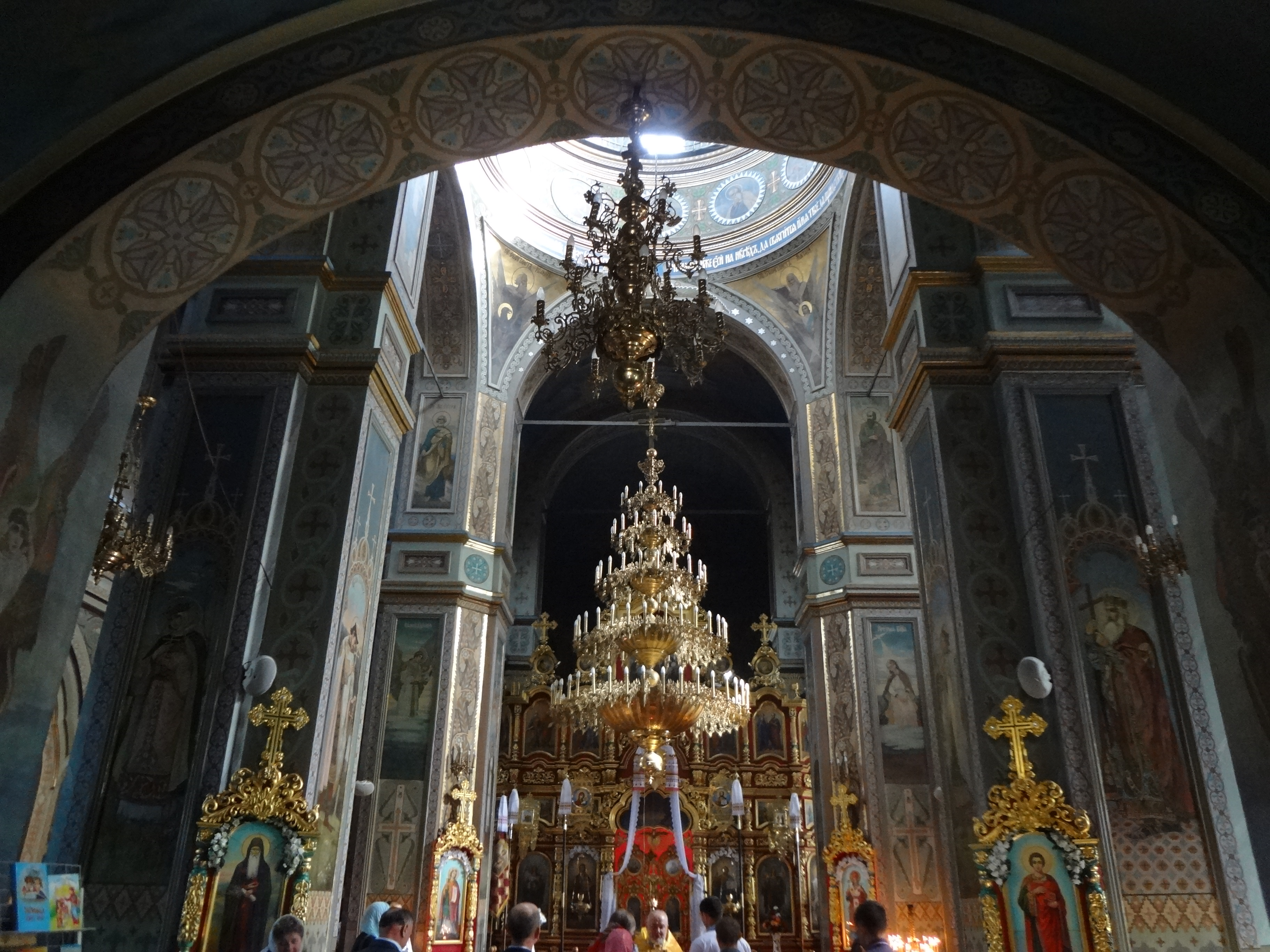 Воскресенський собор (мур.), Рівне, вул.Соборна